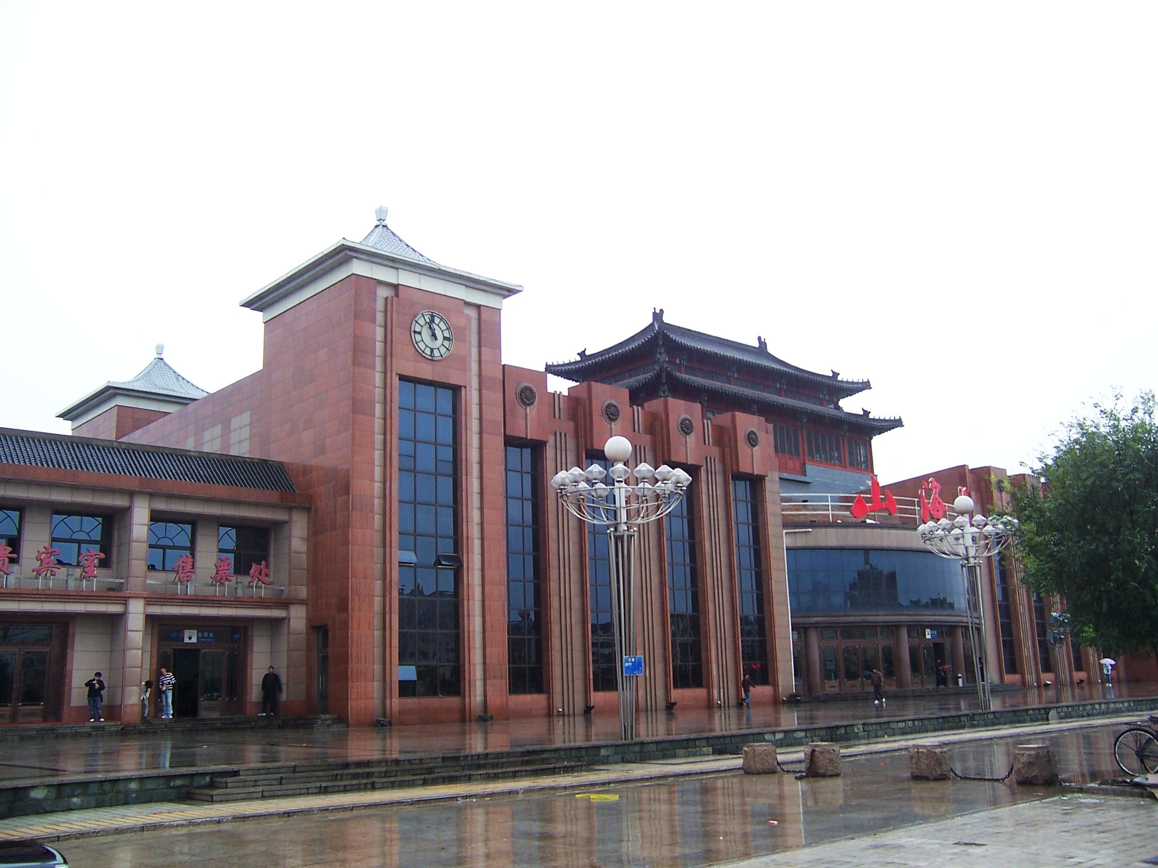 山海关火车站。